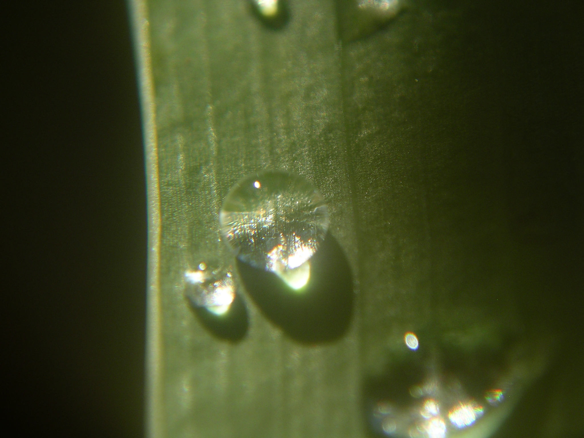 harmat b